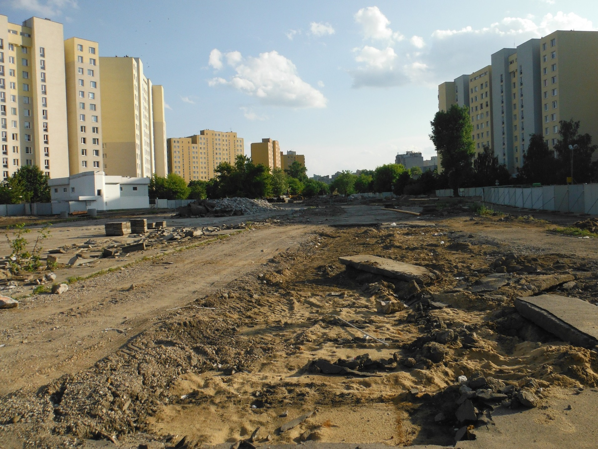 Budowa stacji metra "Trocka" w Warszawie.